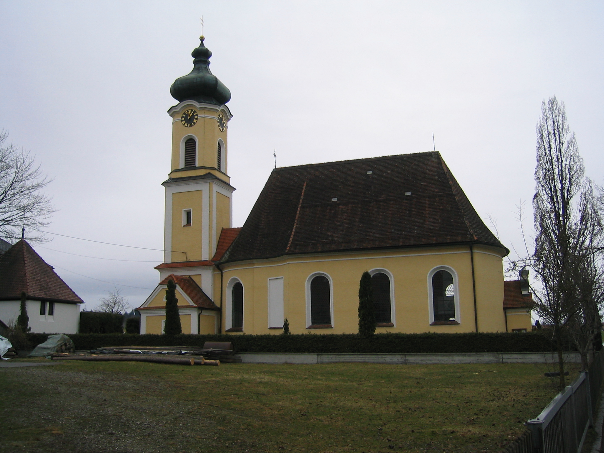 katholische Kirche St. Afra in Lachen (Landkreis Unterallgäu) selbst fotografiert am 30. März 2006